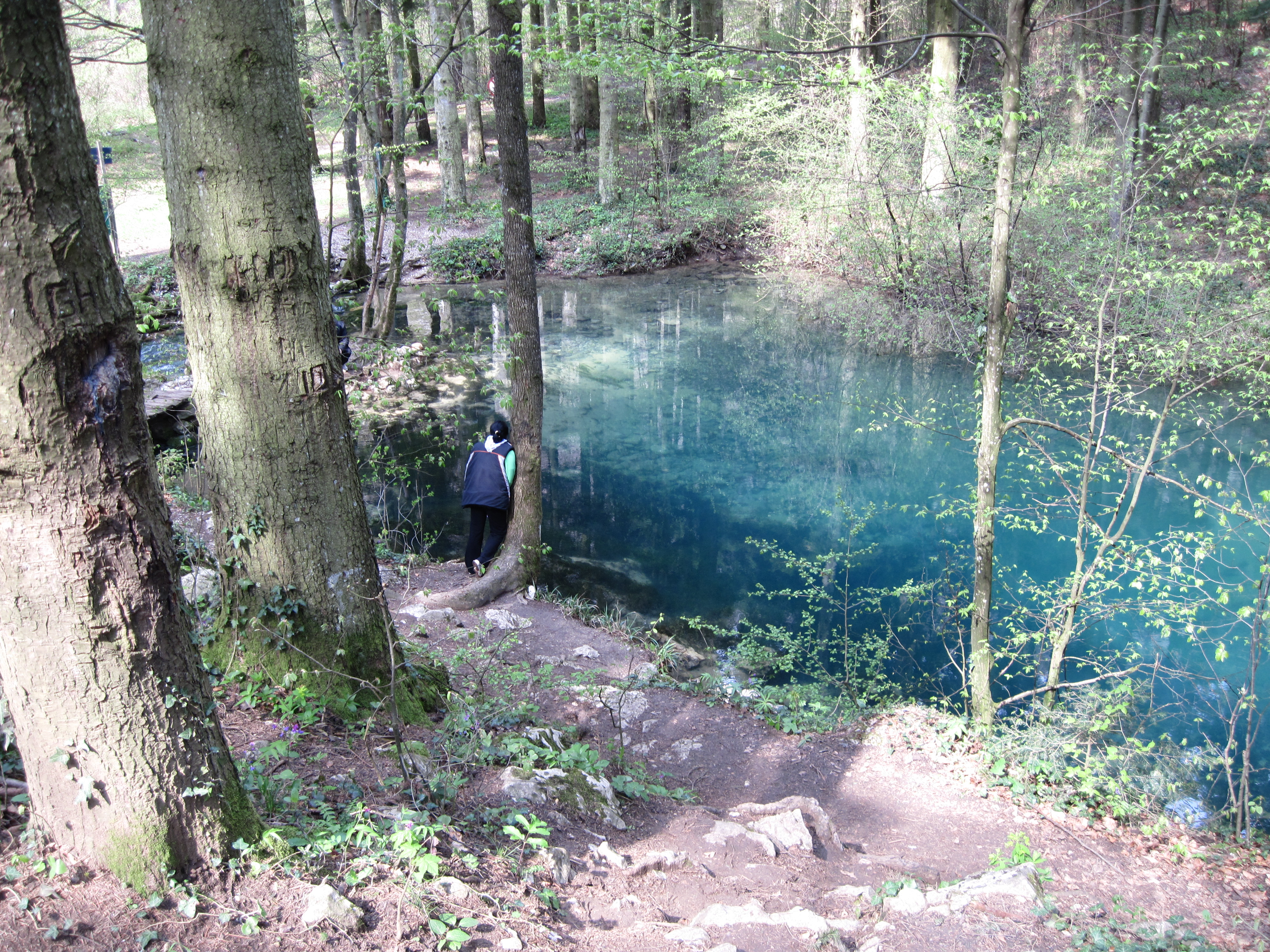 Parcul National Cheile Nerei-Beusnita, caras-Severin, Romania